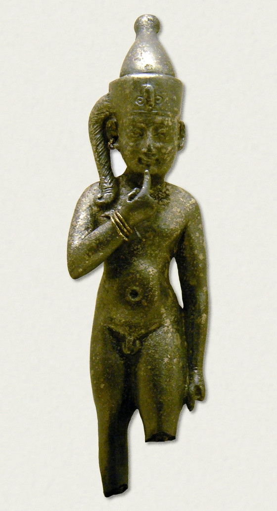 Statuette en argent représentant Harpocrate, époque Greco-romaine, Dynastie Ptolemaïque, 350-30 av JC. Photographiée à la fondation Calouste Gulbenkian à Lisbonne, Portugal.